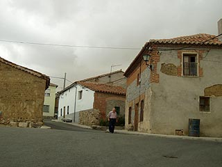 Calle de Peñalba de Ávila. Autor de la foto: Eugenio Vega [colaborador de Wikipedia] agosto de 2005. Libre de derechos.